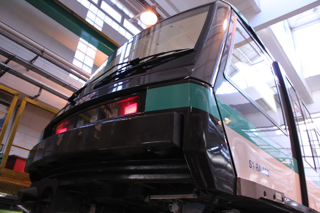 Un train MP 05 aux ateliers de Fontenay